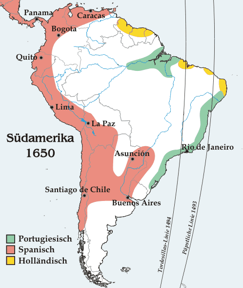 Kolonisation Südamerikas im Jahr 1650, selbst erstellt